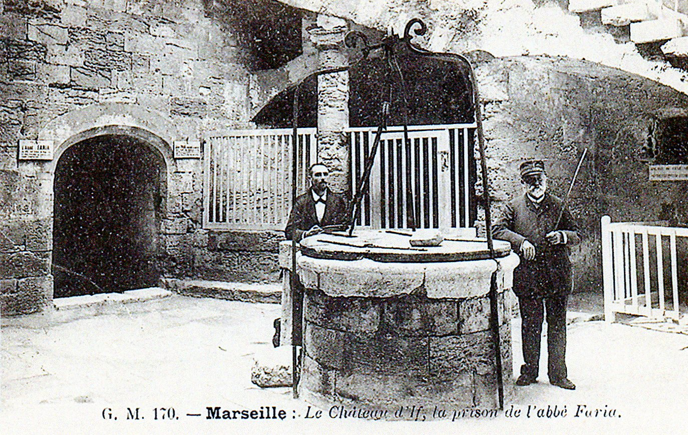 interno del castello d'If, Marsiglia